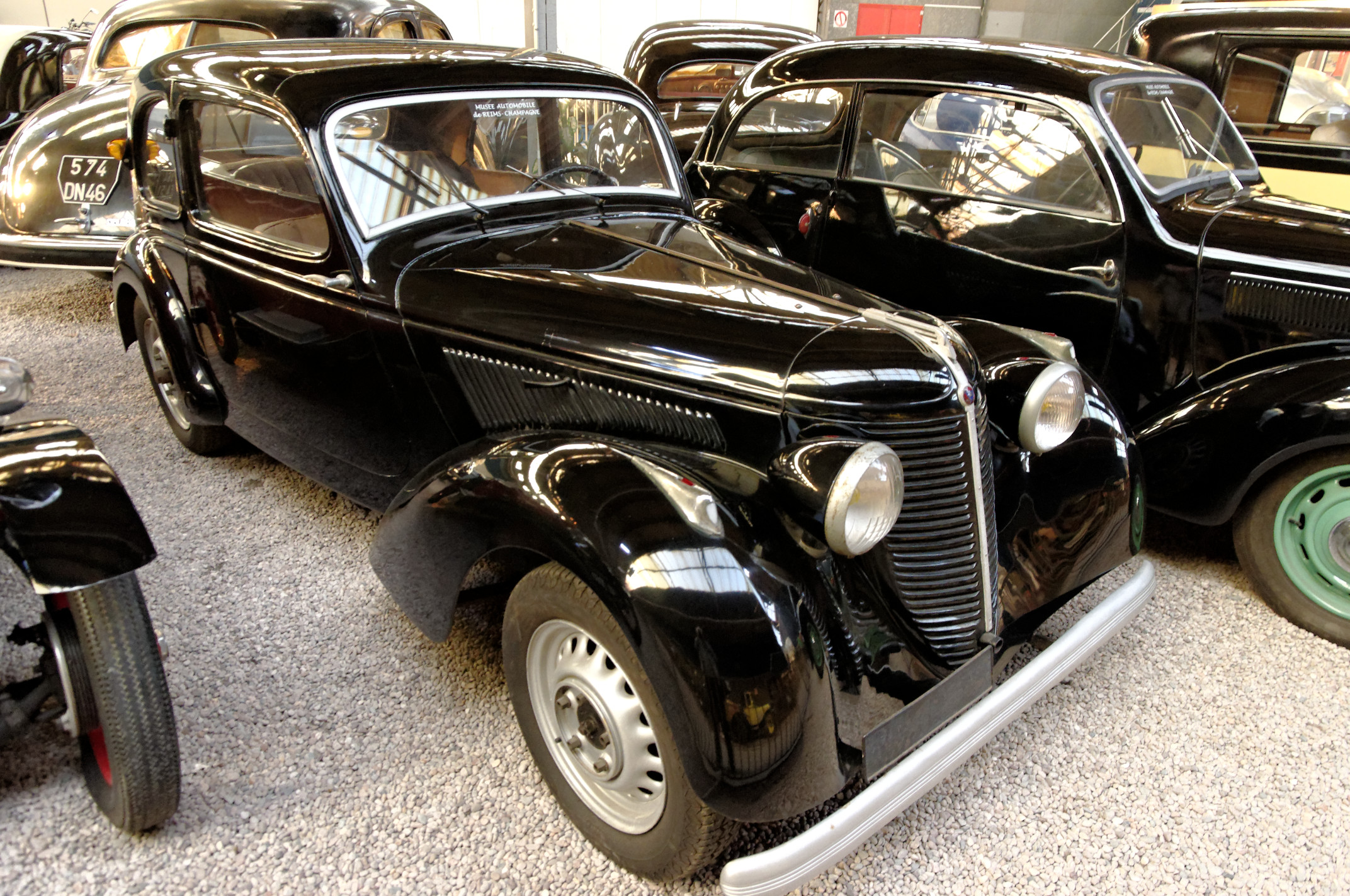 Amilcar B 38 Compound (1939), Coach 4 places, 4 cyl. en ligne, latéral, 1185 cm3, 33 ch., vitesse max. 115 km/h (Musée Automobile Reims Champagne, Reims, Marne, France)